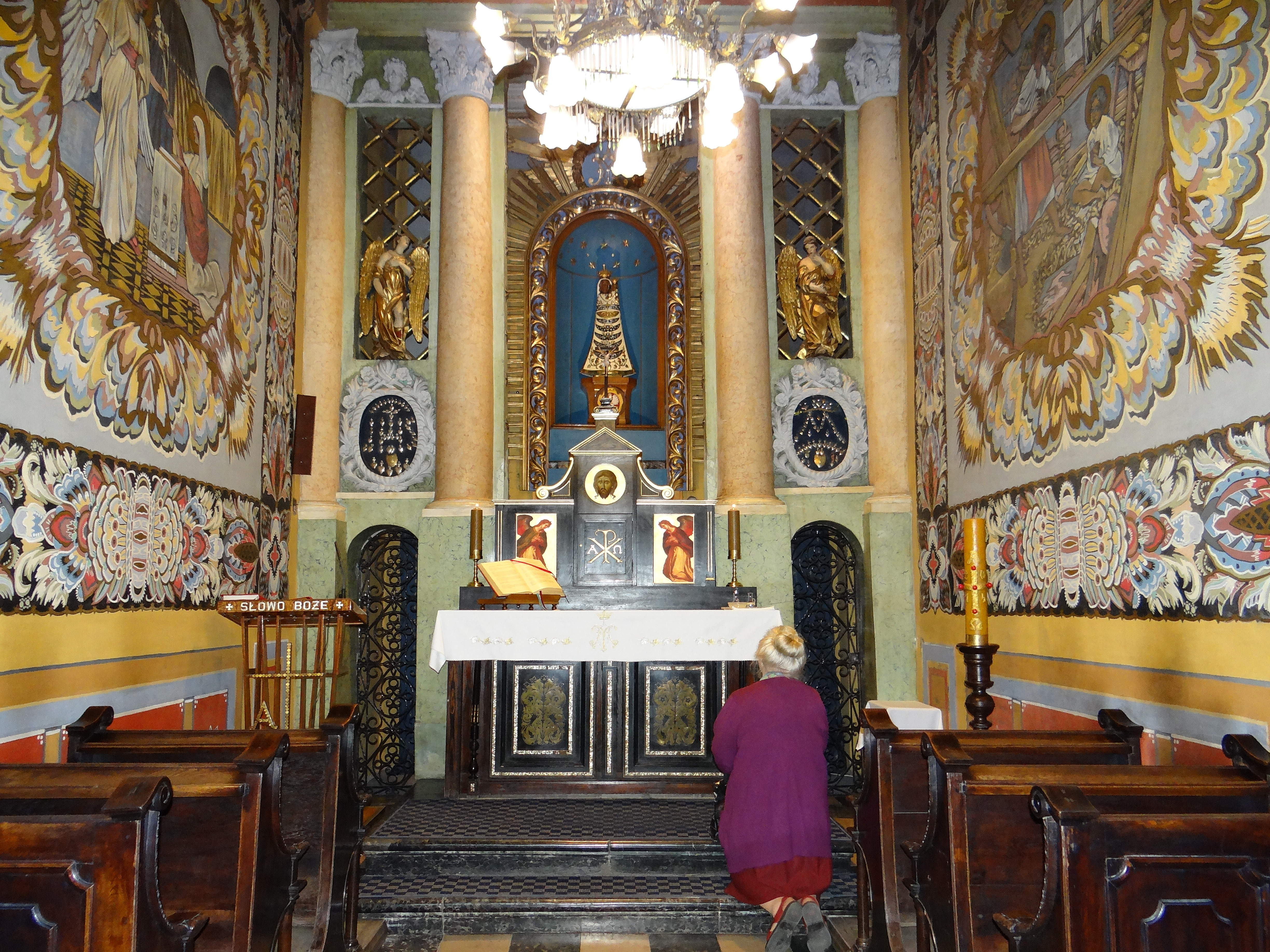 Kraków, Domek Loretański, 1712-1719